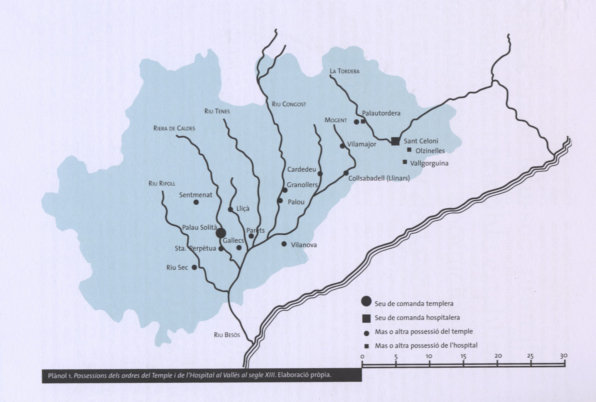 Mapa de les possessions del Temple i l'Hospital al Vallès, segle XIII. (s/. J. Fuguet, a "Arraona", 27, Sabadell, 2003, p. 258).